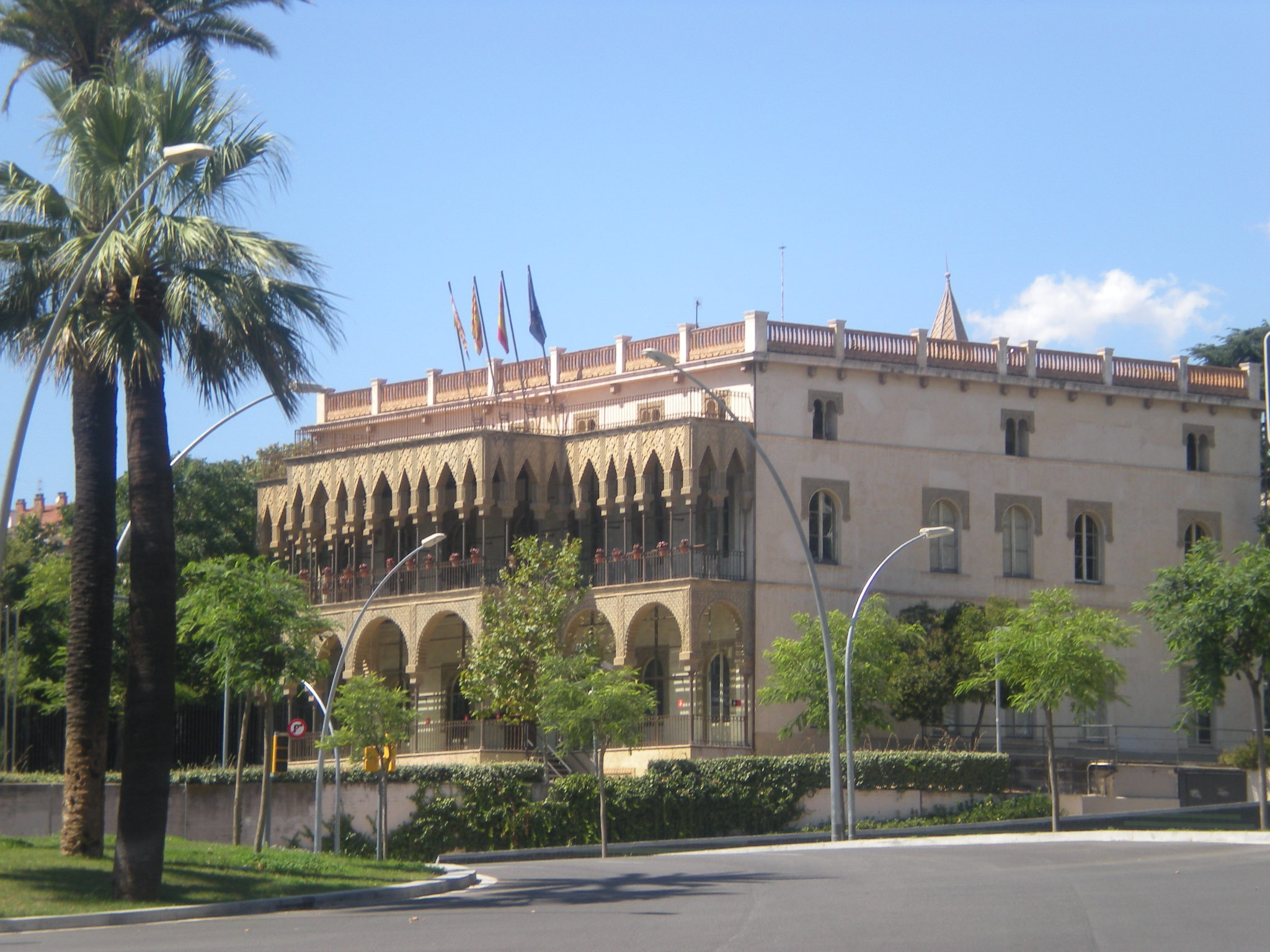 Casa de les Altures, Horta-Guinardó, Barcelona